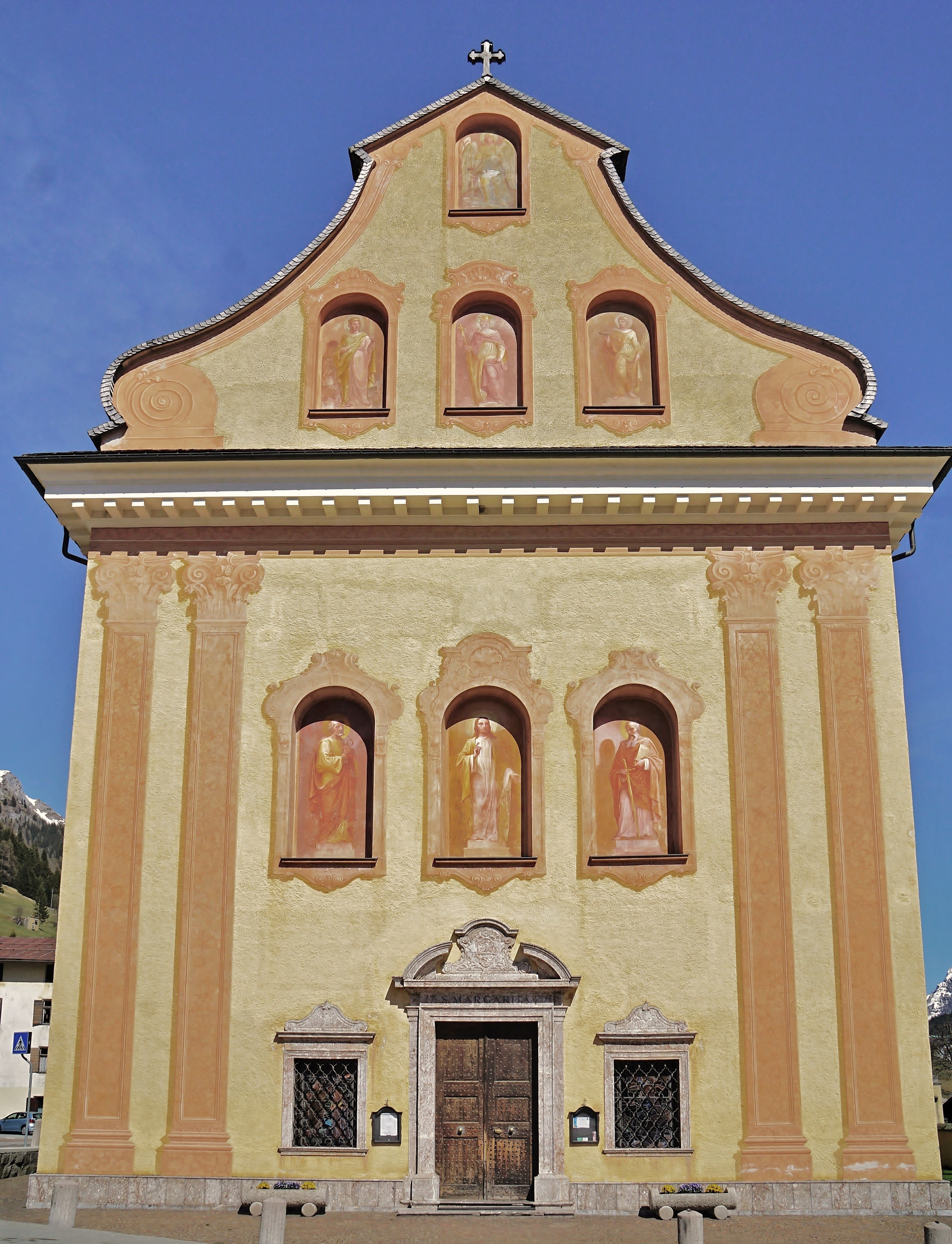 Westfassade der Pfarrkirche St. Margareta in Sappada, Italien